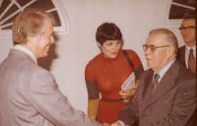 Jimmy Carter saludando a Aparicio Méndez, presidente de Uruguay.